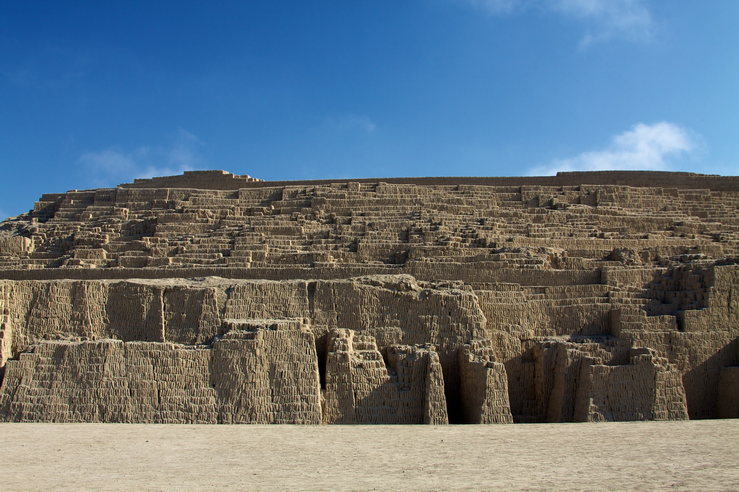 Huaca Pucllana en Miraflores, Perú